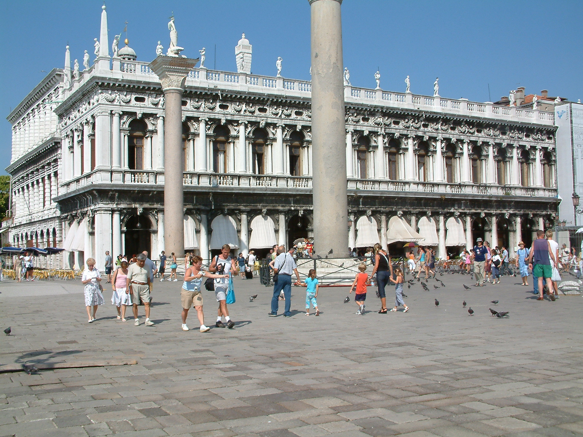 Venice, Biblioteca Nazionale Marciana (National Library).